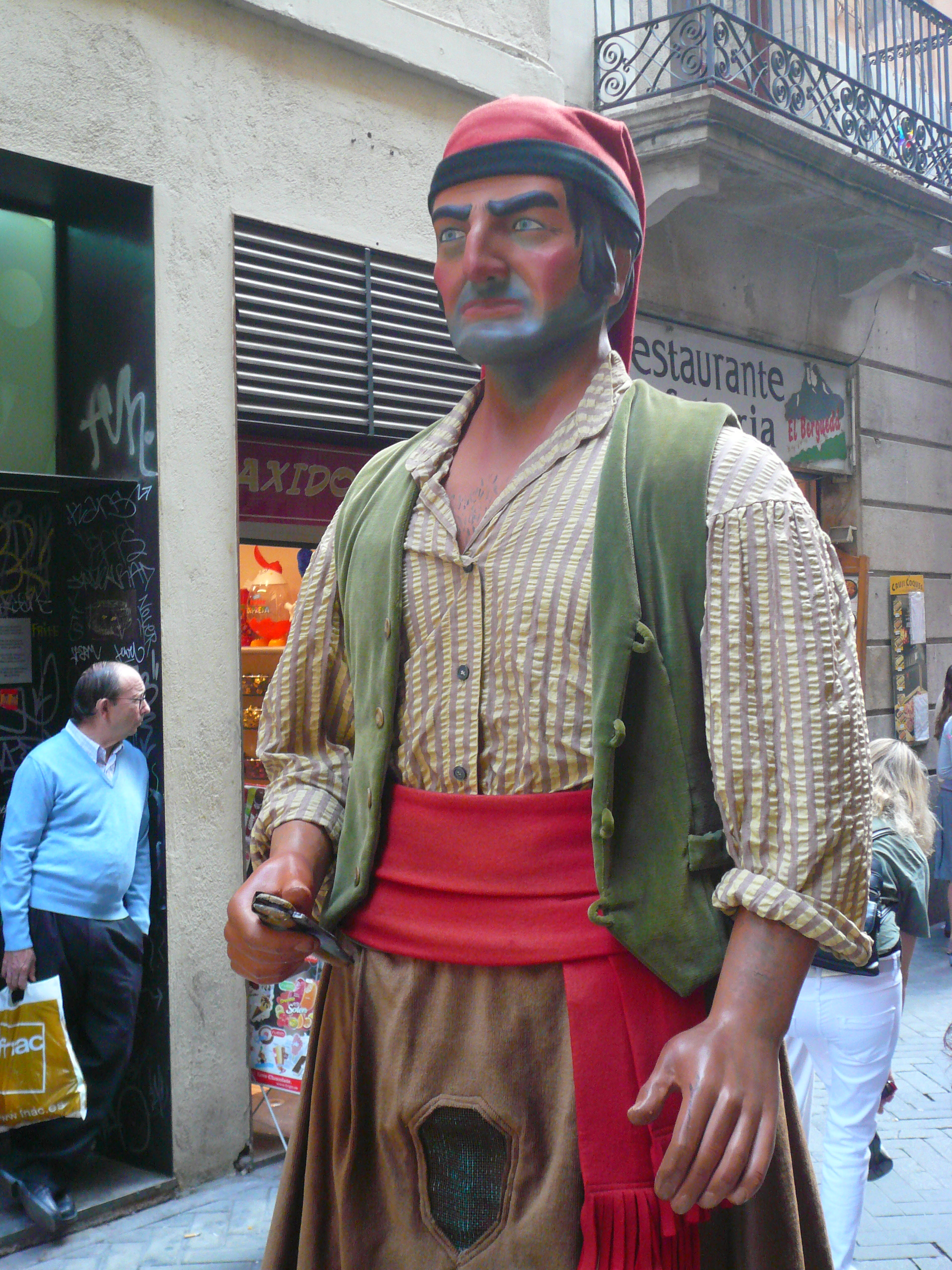 Cavalcada de gegants de les festes de la Mercè del 2008, al tram del carrer Cardenal Casañas, carrer del Pi, carrer Canuda i la Rambla